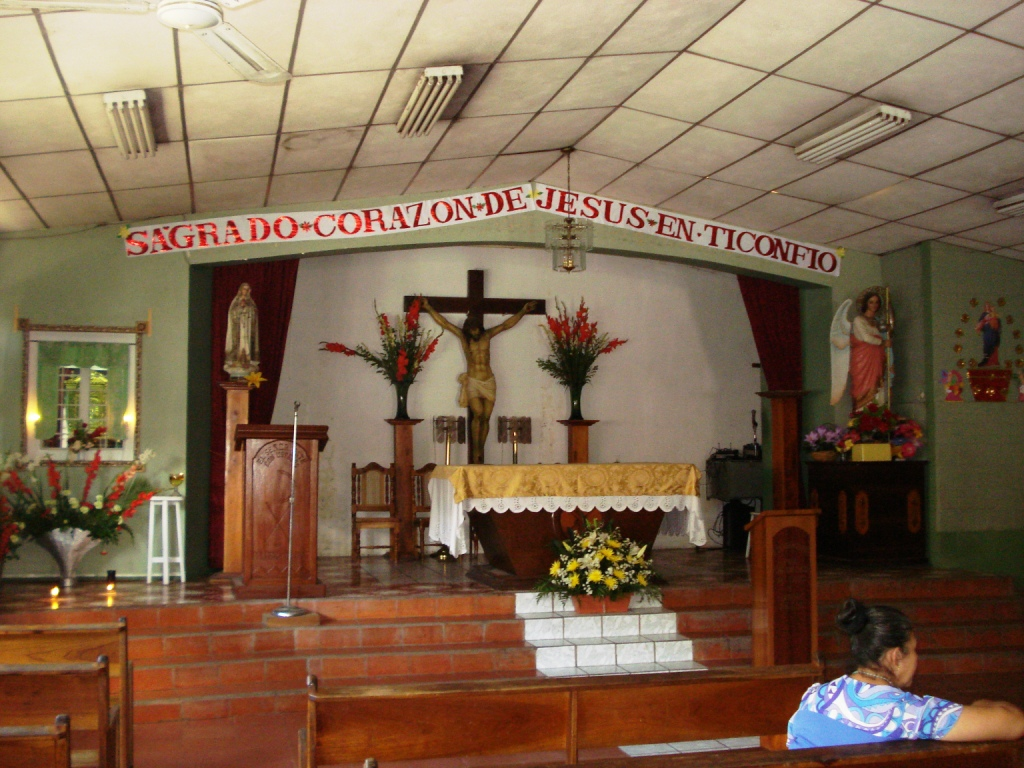 Iglesia Catolica